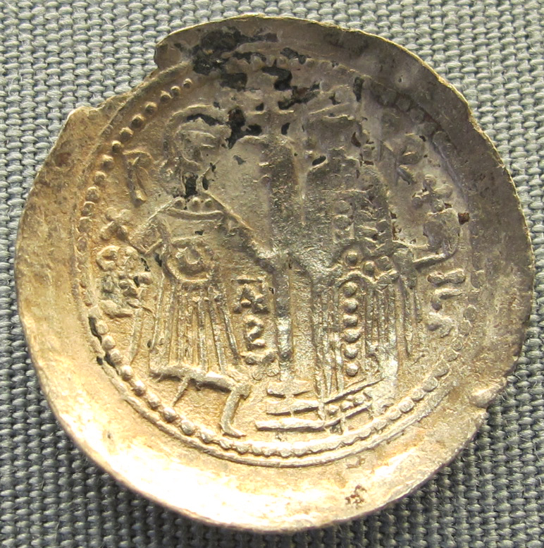 Palermo, ducalis di ruggiero II d'altavilla, 1130-1154